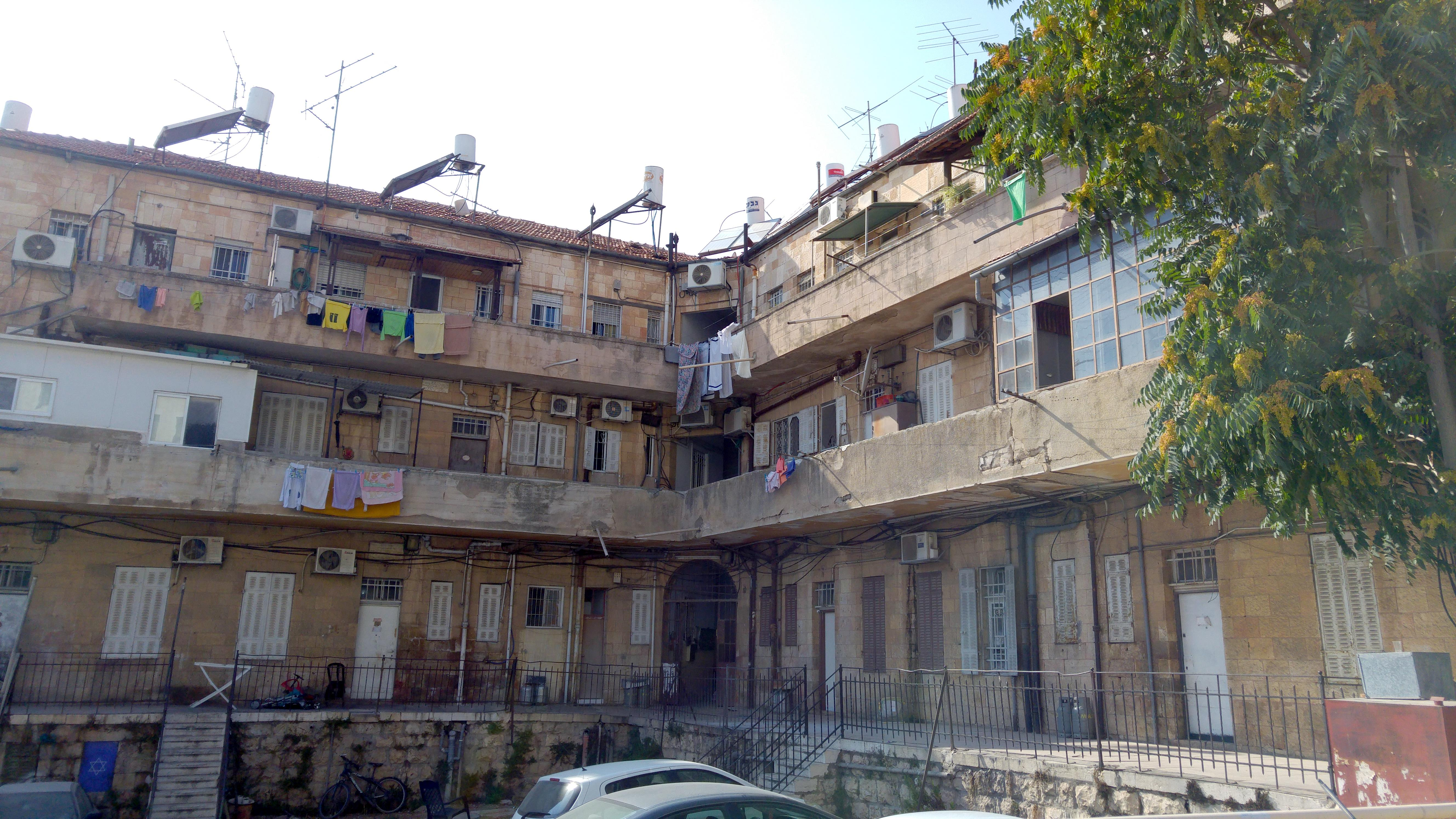 שכונת עץ חיים, ירושלים